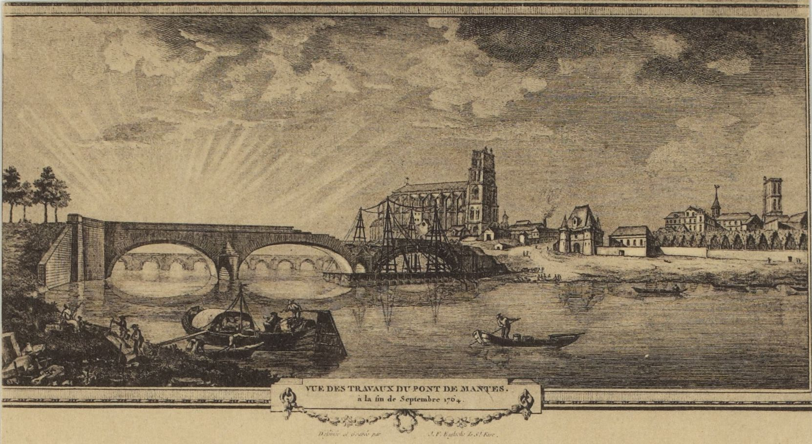 Travaux de construction du pont Perronet à Mantes-la-Jolie vers 1764. Gravure de la fin du XVIIIe siècle reproduite sous forme de carte postale vers 1900. On aperçoit en arrière plan l'ancien pont de Mantes au nombreuses arches